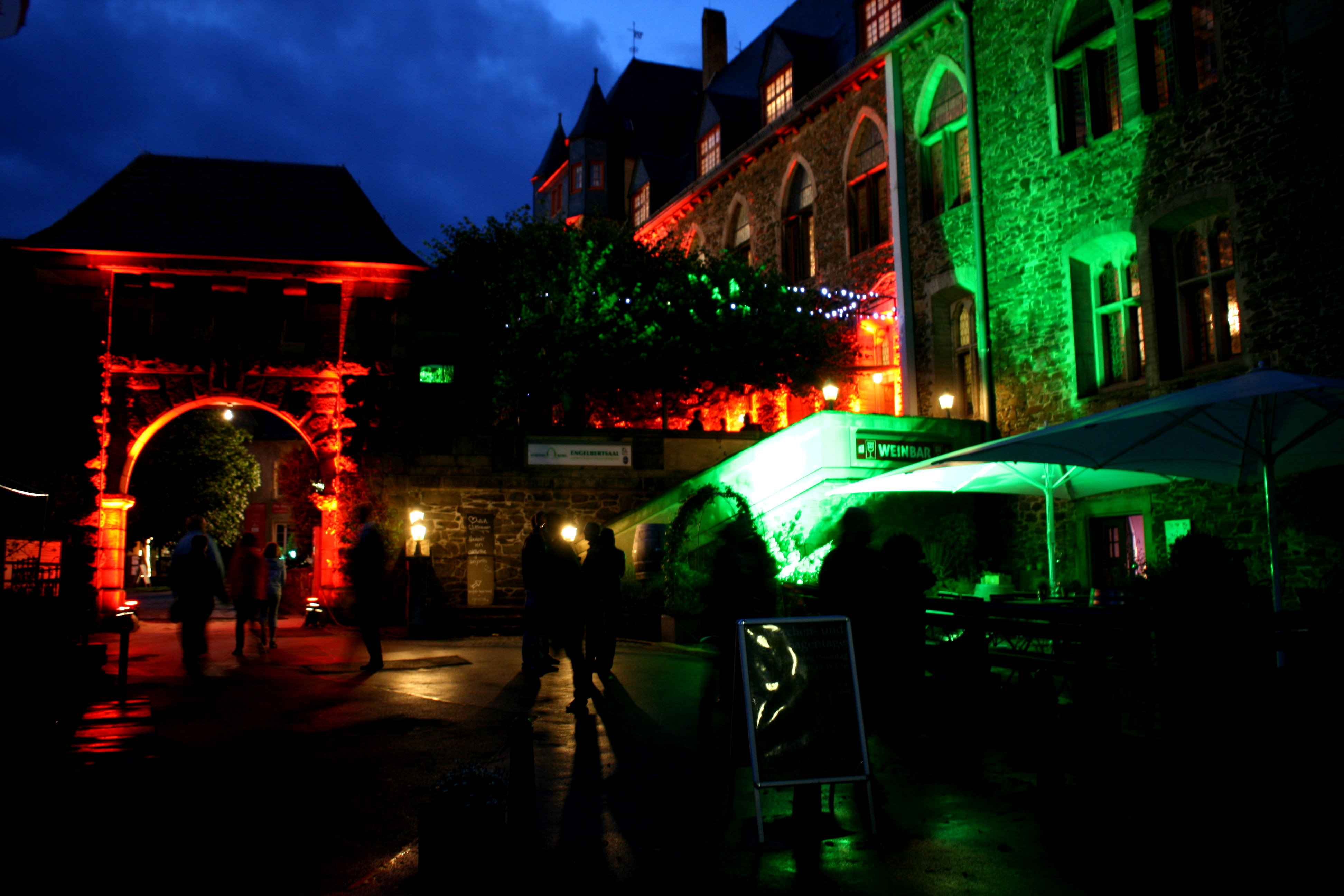 Kultursommernacht 2011 in Schloss Burg, Solingen-Burg